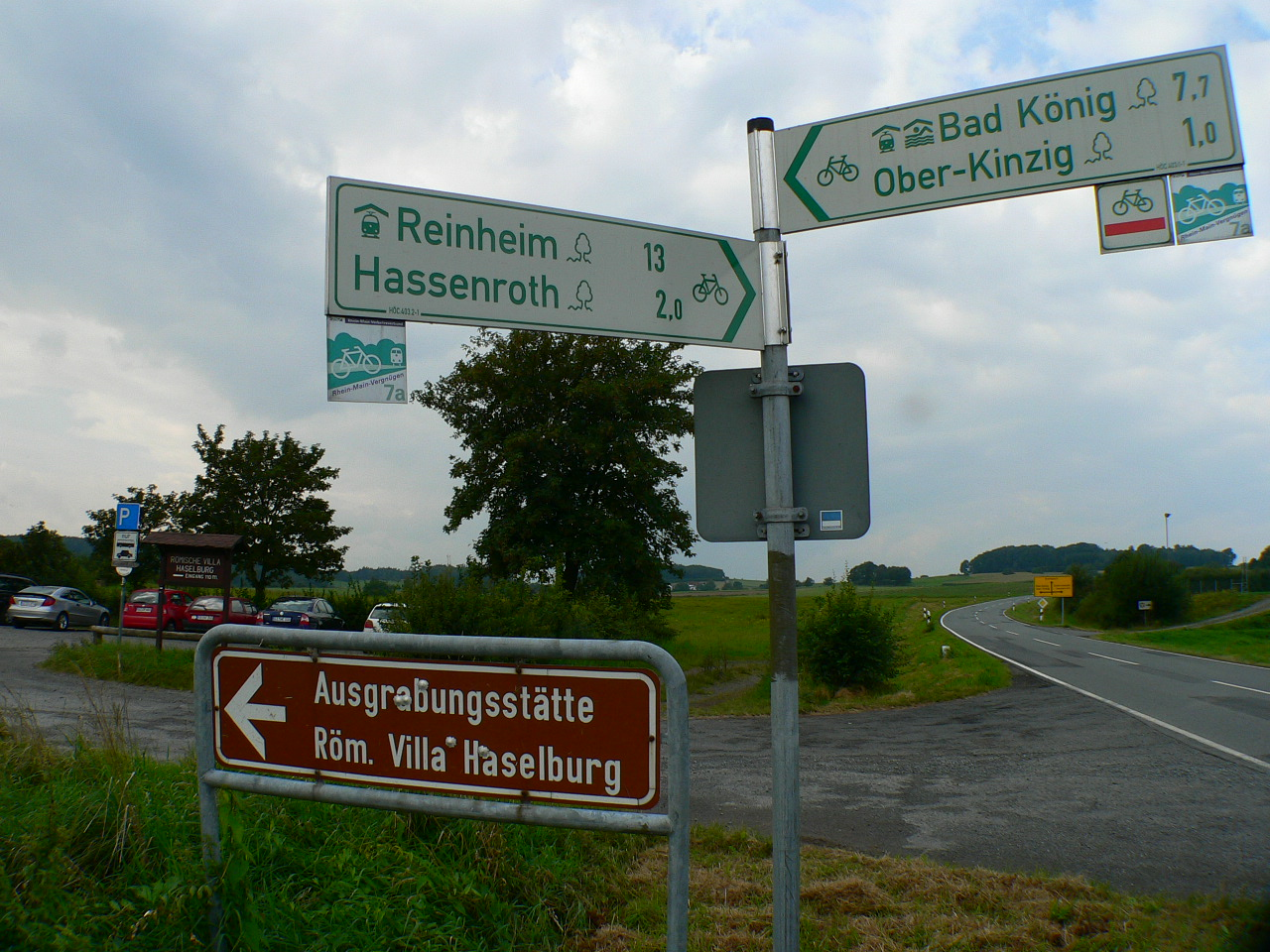 Römische Villa Haselburg im Odenwald, Hessen, Parkplatz mit Wegweisung